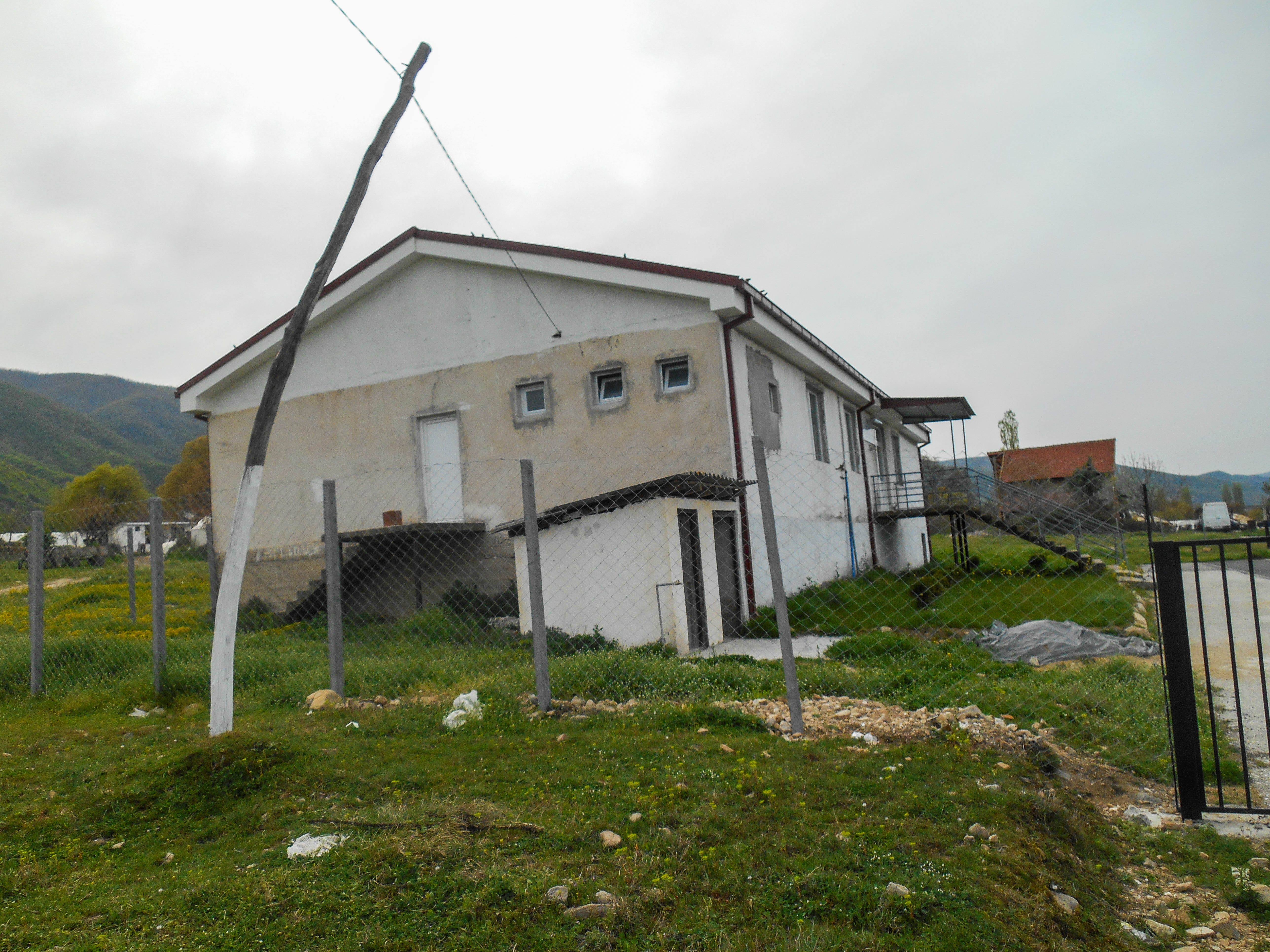 Училиште Даме Груев - Свидовица